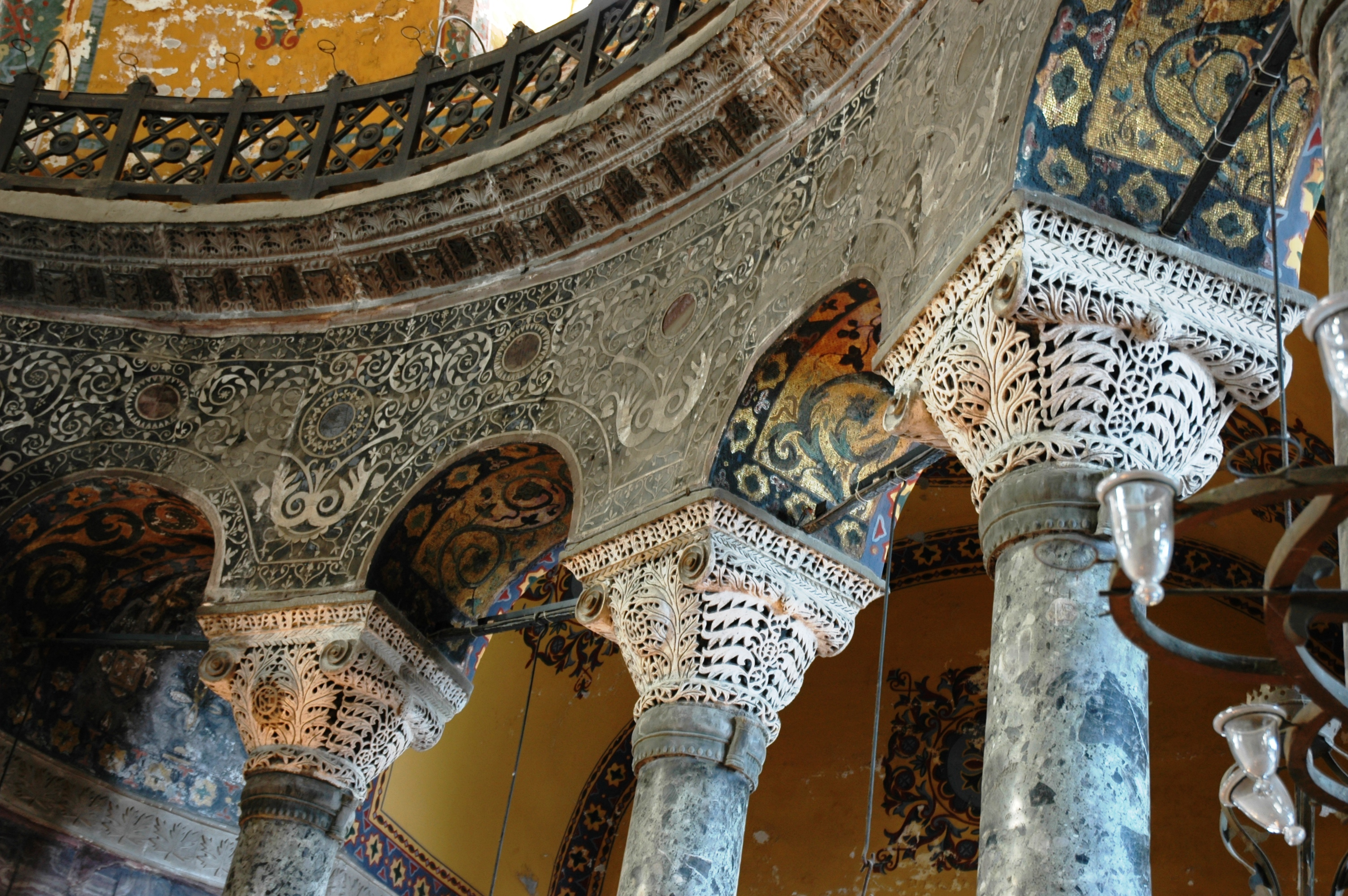 Santa Sofia - Interior - Detall pis superior